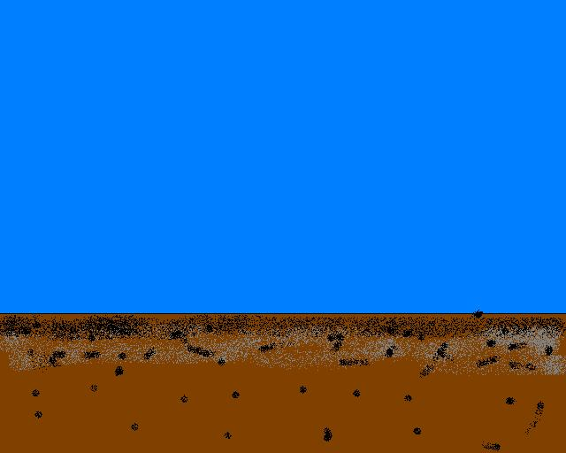 凸堤效應步驟一